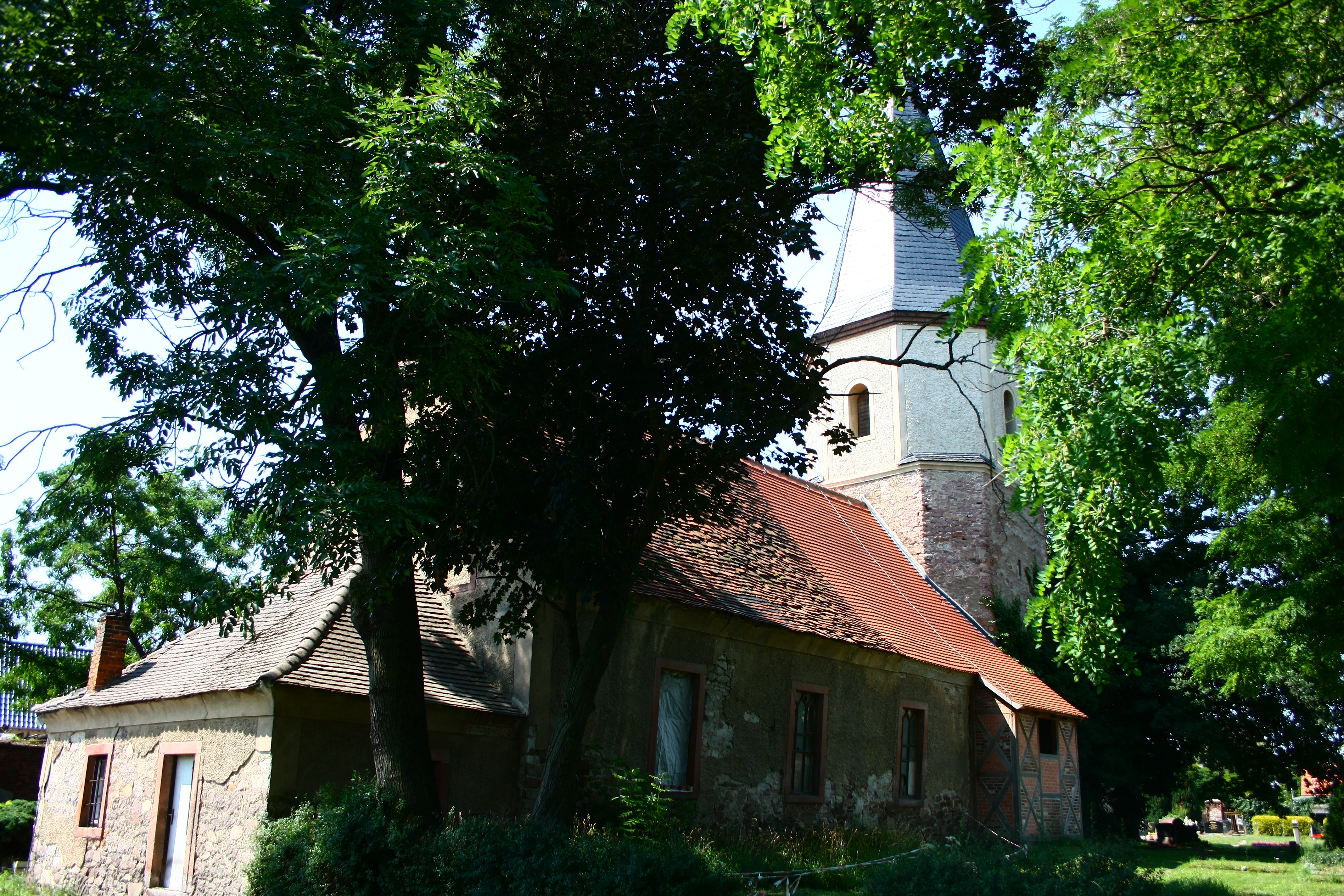 die Dorfkirche von Kösseln bei Plötz im Saalekreis